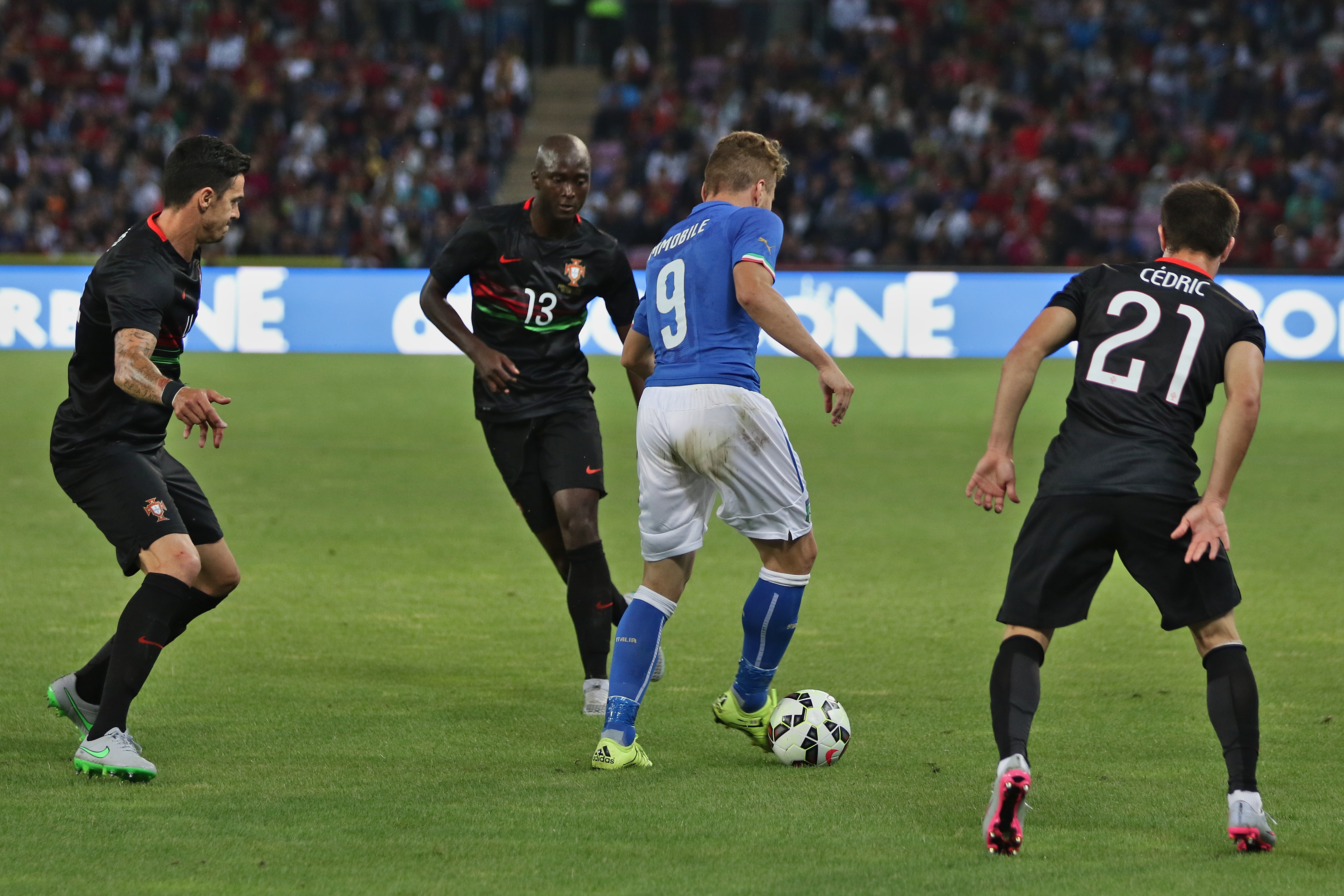 20150616 - Portugal - Italie - Genève - Ciro Immobile au milieu de la défense portugaise